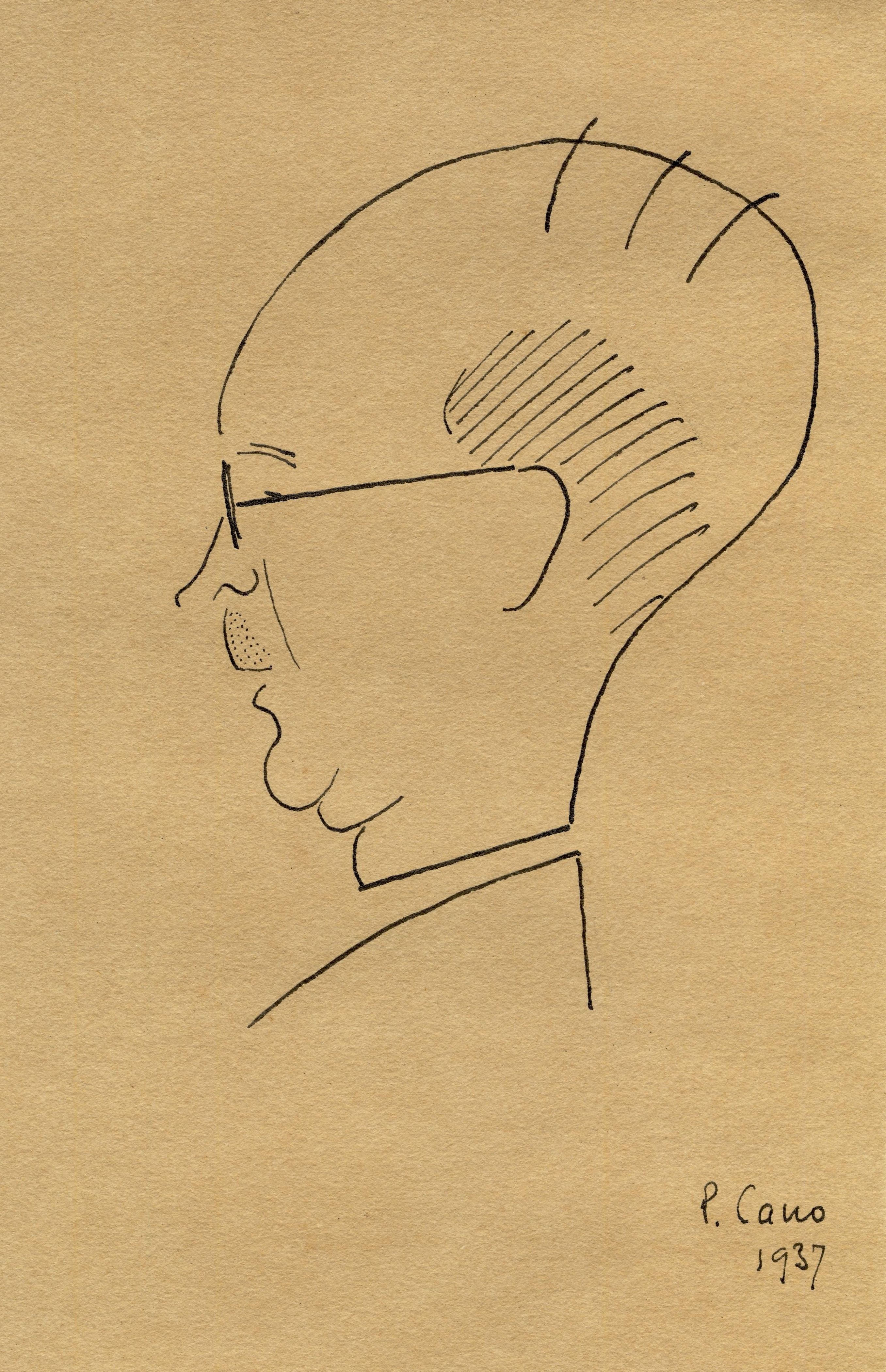 Caricature de Fernand François par Cano